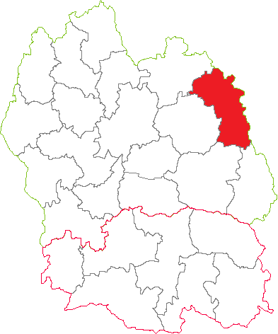 Situation du canton dans le département de la Lozère (France)